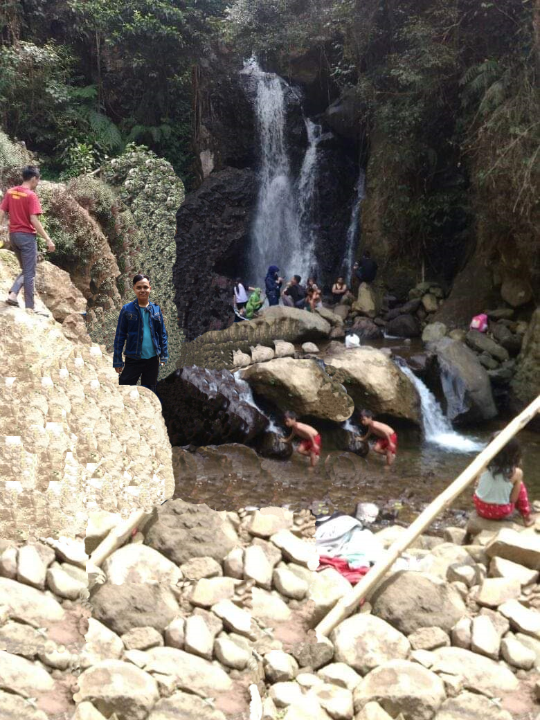 Curug Cipamingkis Bogor